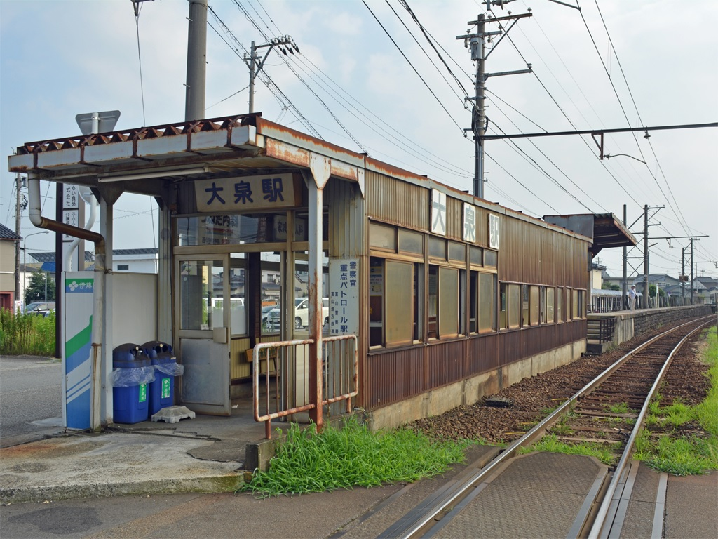 富山地方鉄道不二越線 大泉駅